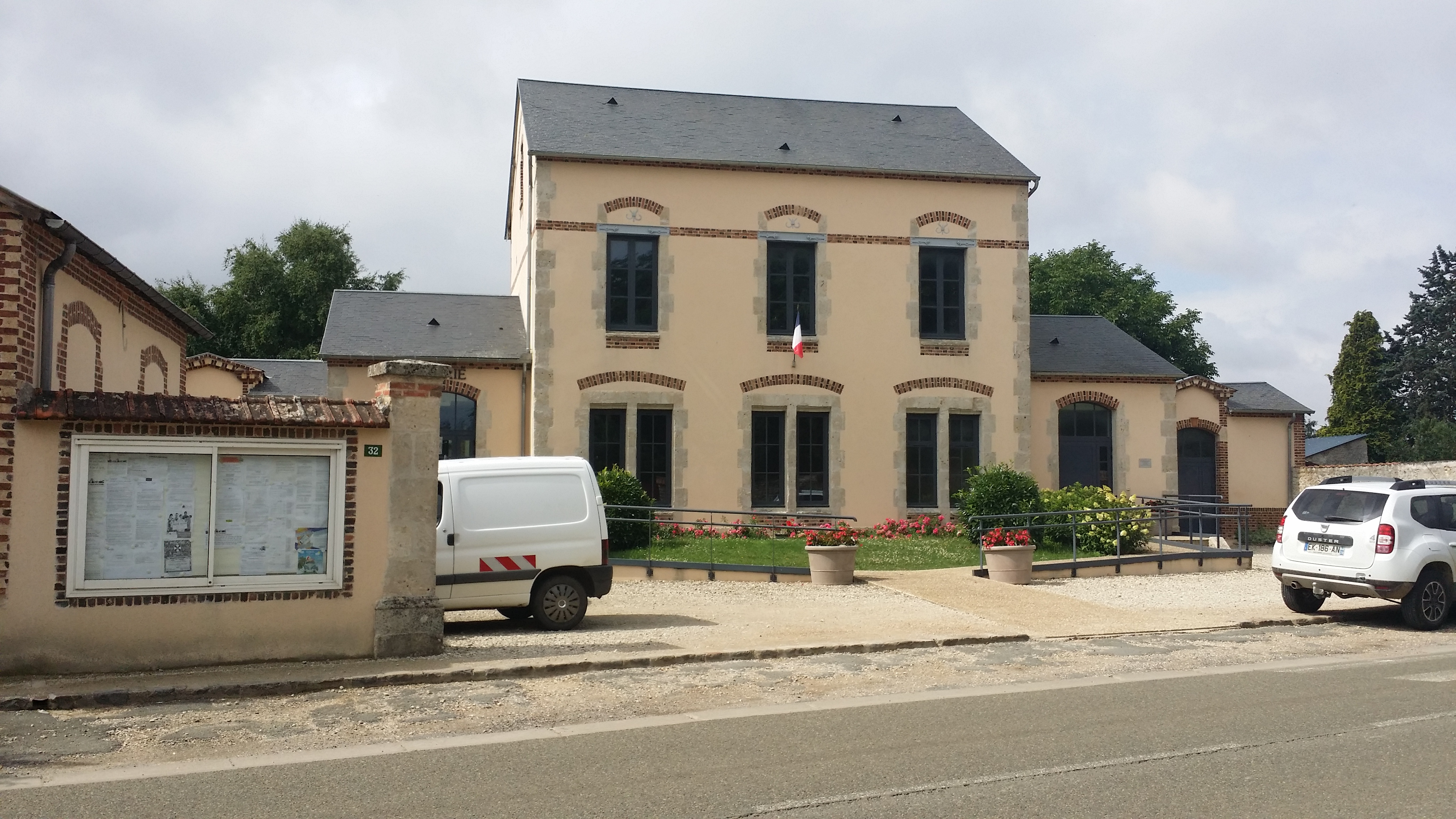 Visite de Gouillons (28), mairie